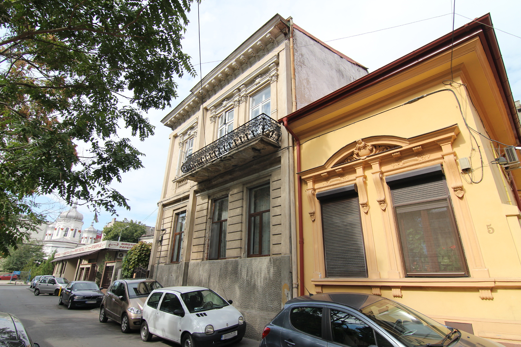 Casă pe Stelea Spătarul